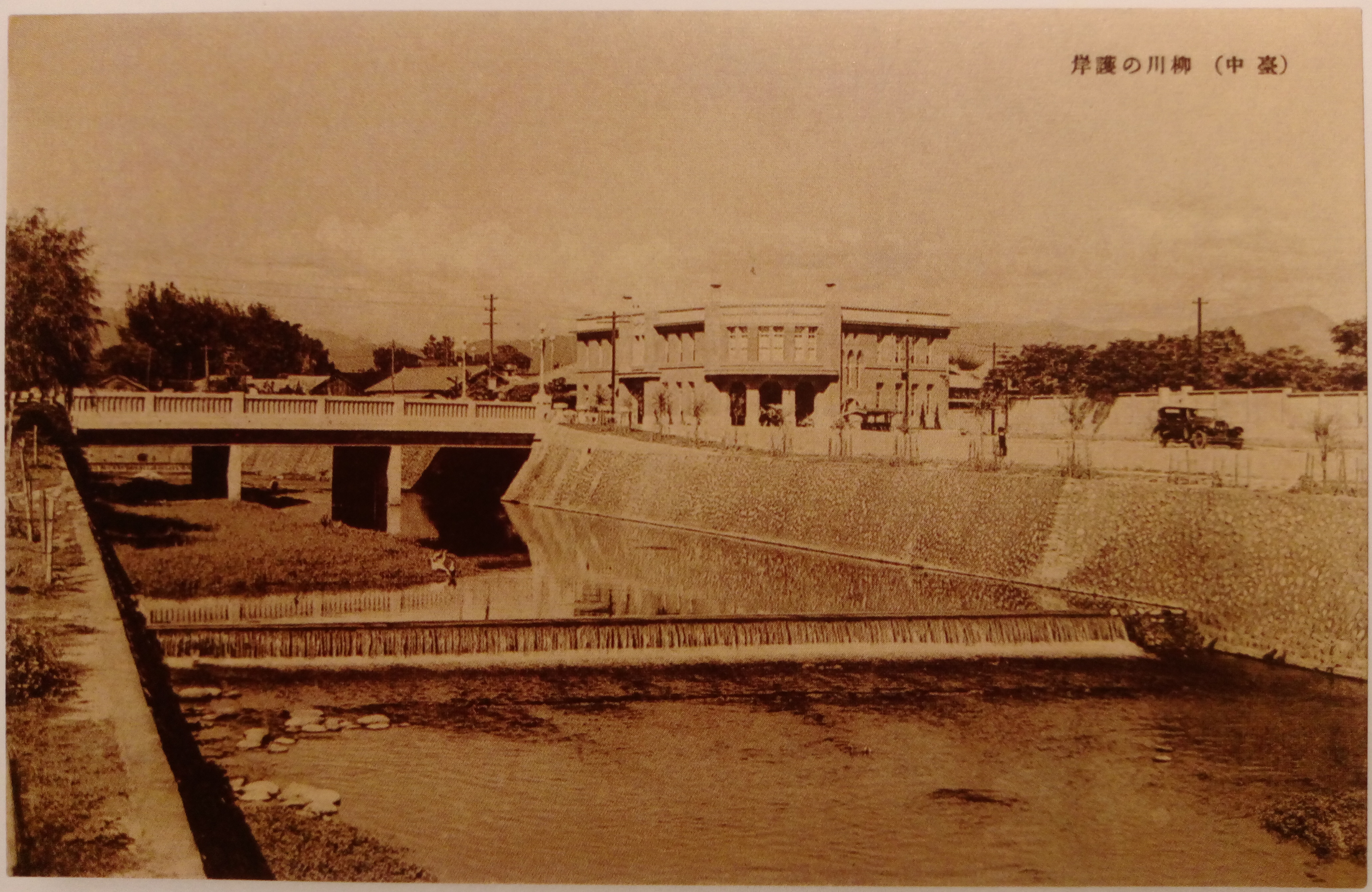 臺中柳川（岸邊建築為宮原眼科）。